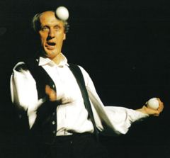 Herman van Veen, Jonglage, "Nachbar"-Programm 1998